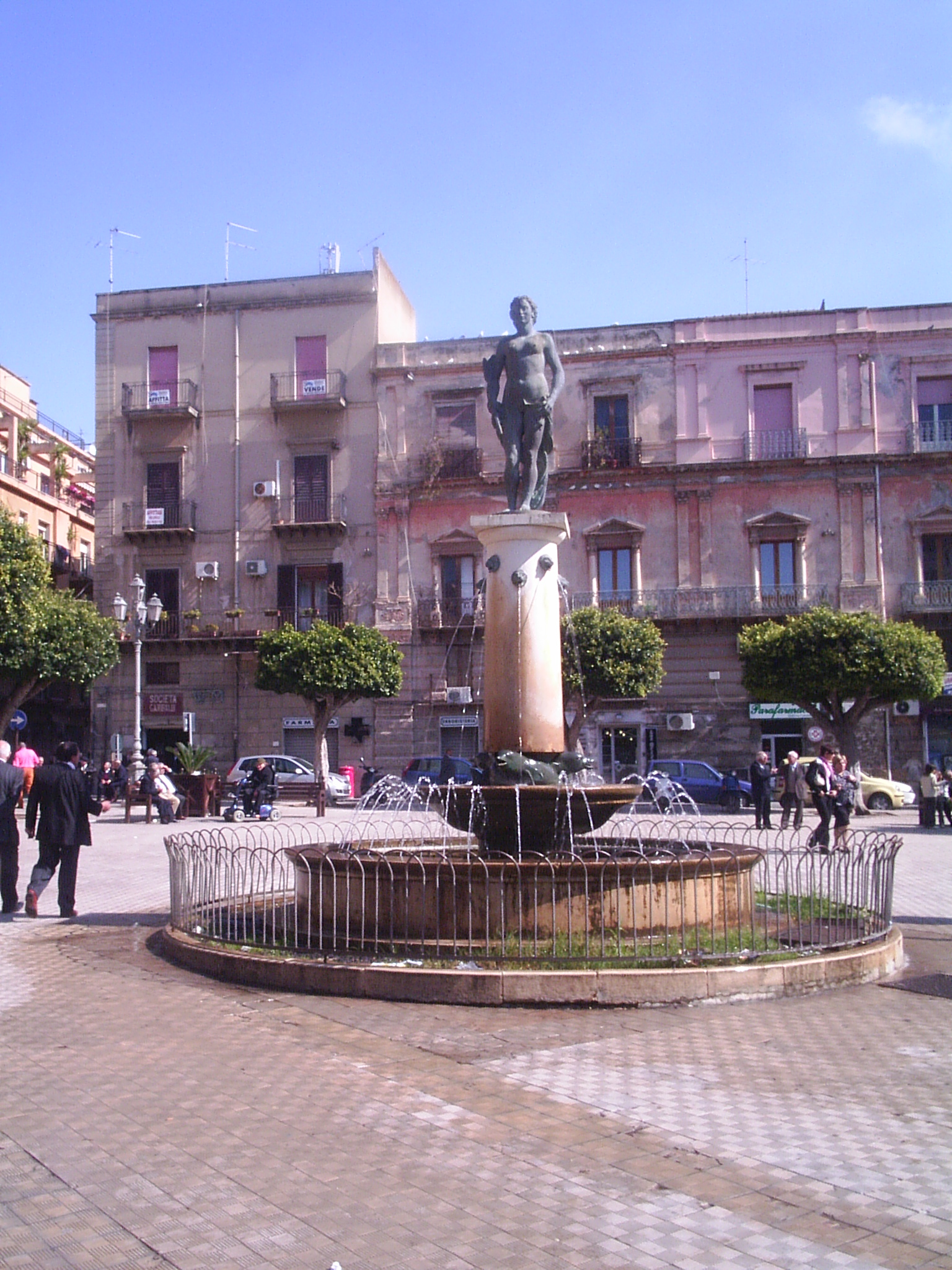 Gela, Fontana di Piazza Umberto I. Immagine scattata il Venerdì Santo.